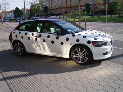 Systemtext heldekorerade Volvo C30